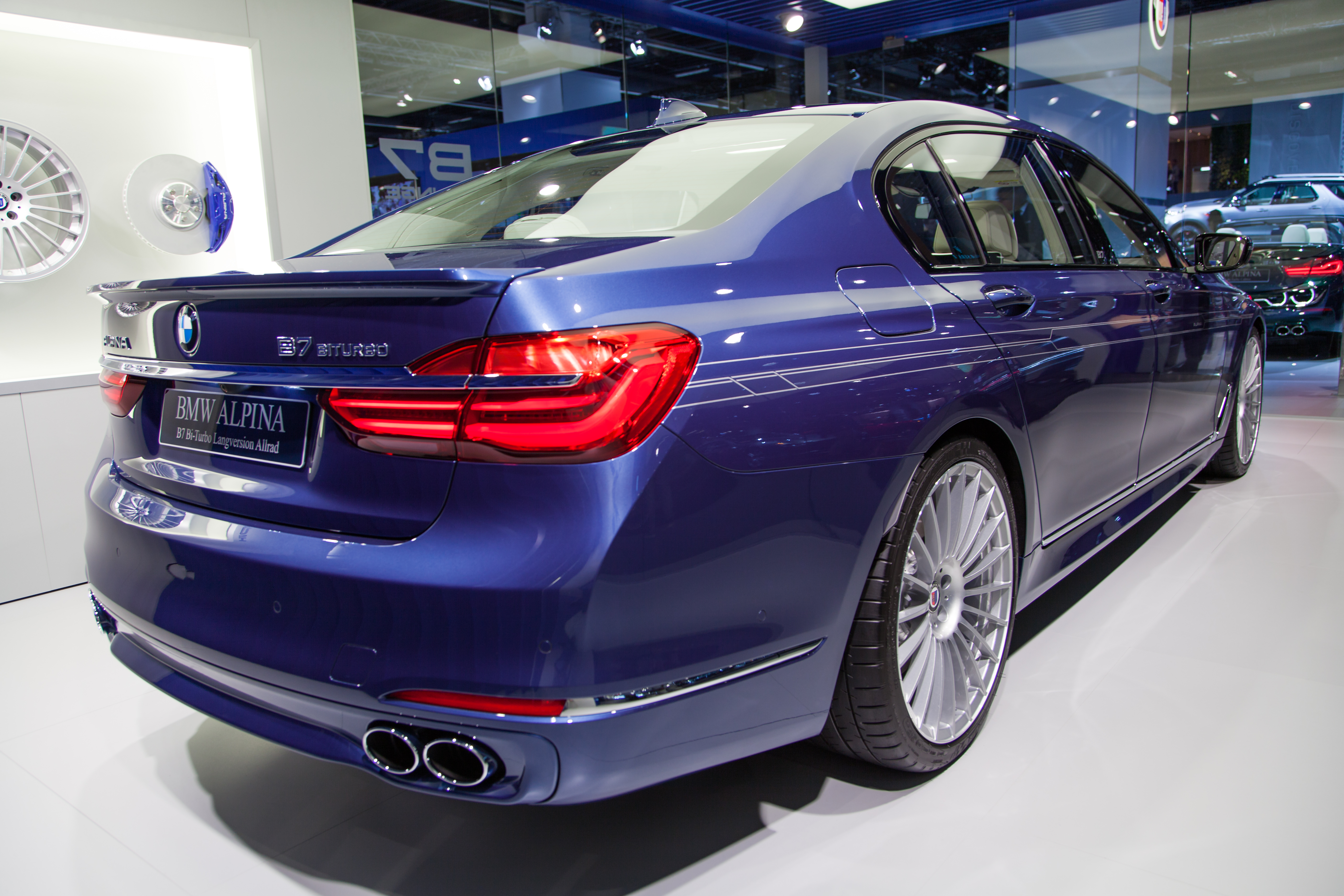 Alpina B7 Bi-Turbo Langversion